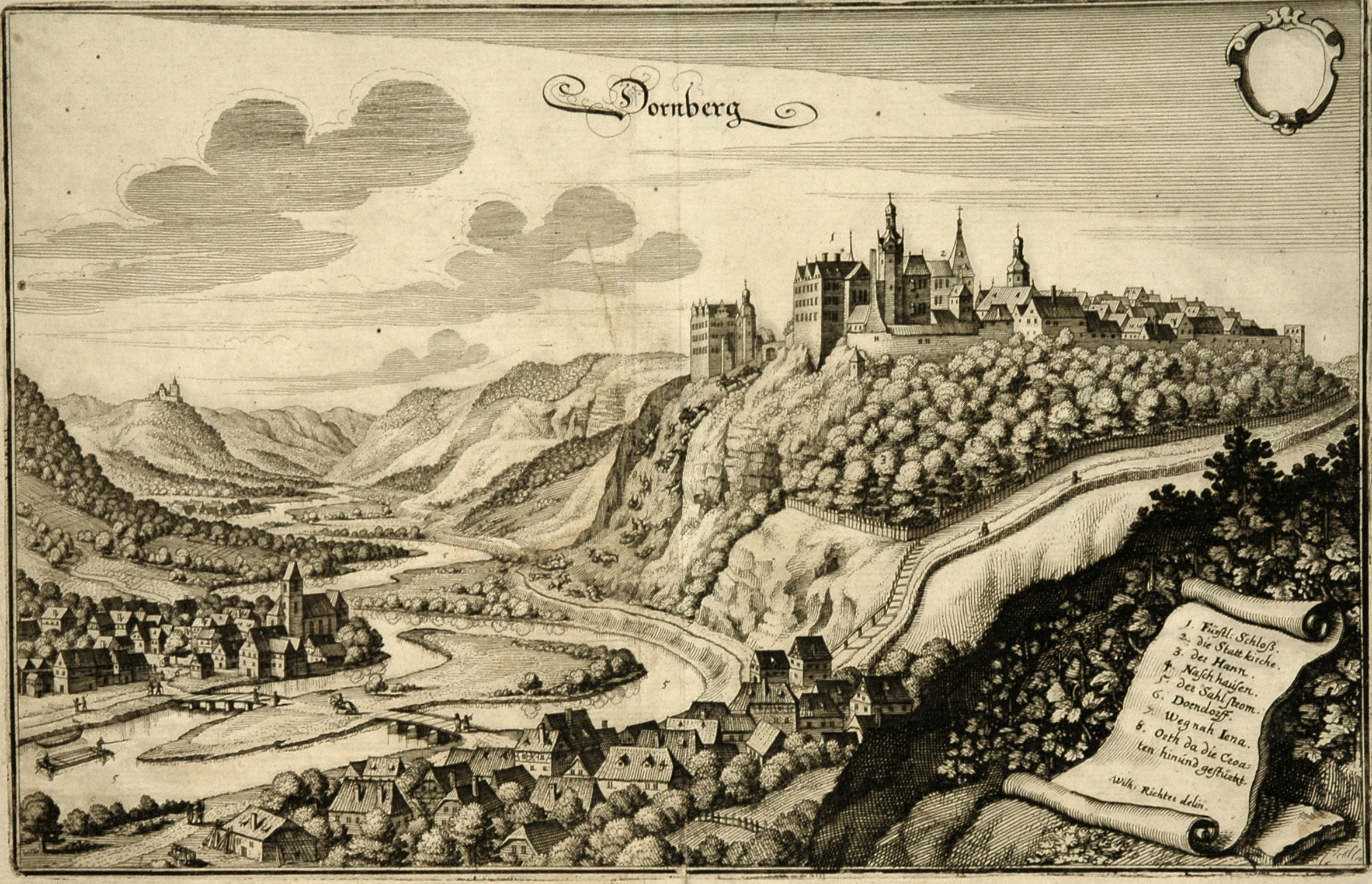 Dornburg/Saale um 1650; Kupferstich von Wilhelm Richter, Weimar (1626 - 1702), 1650; 20,5 x 32cm. Der Stich ist ein Beitrag zu Merians Topographie Obersachsens.